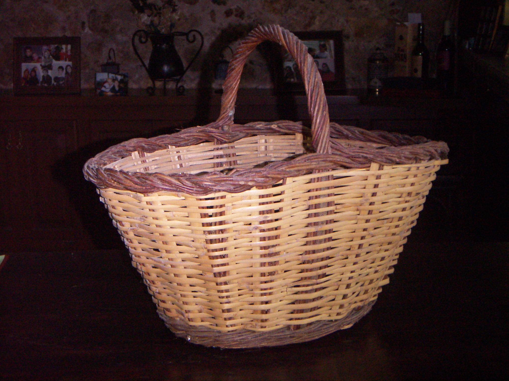 Cistel d'anar a caçar bolets fet de canya i vimet. autor:Jordi coll costa 12:55, 21 November 2006 (UTC)